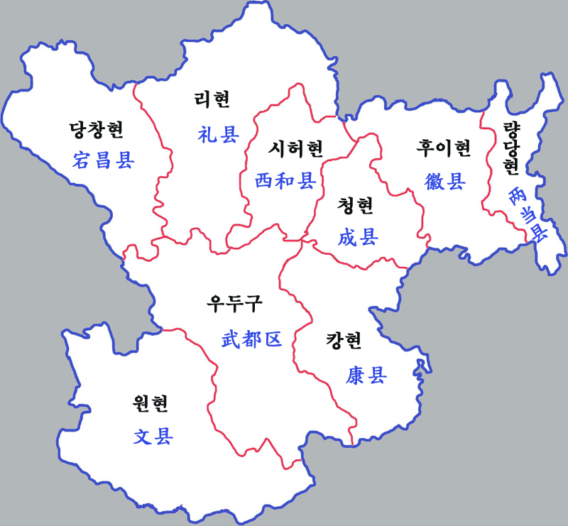 롱난시 현급구역도